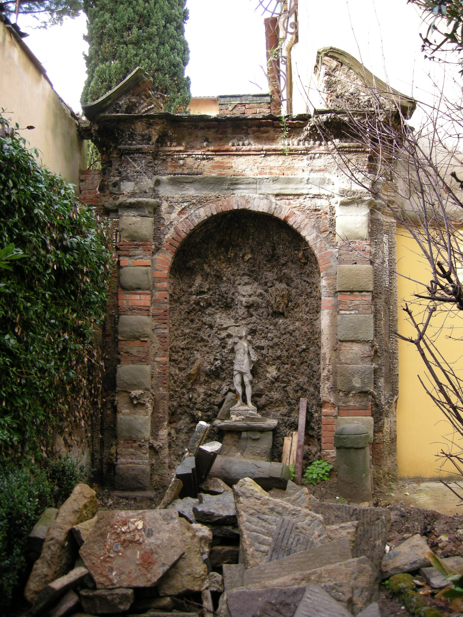 Palazzo Roffia, giardino